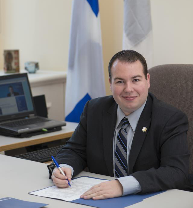 Photo de Dave Turcotte député de l'Assemblée nationale du Québec